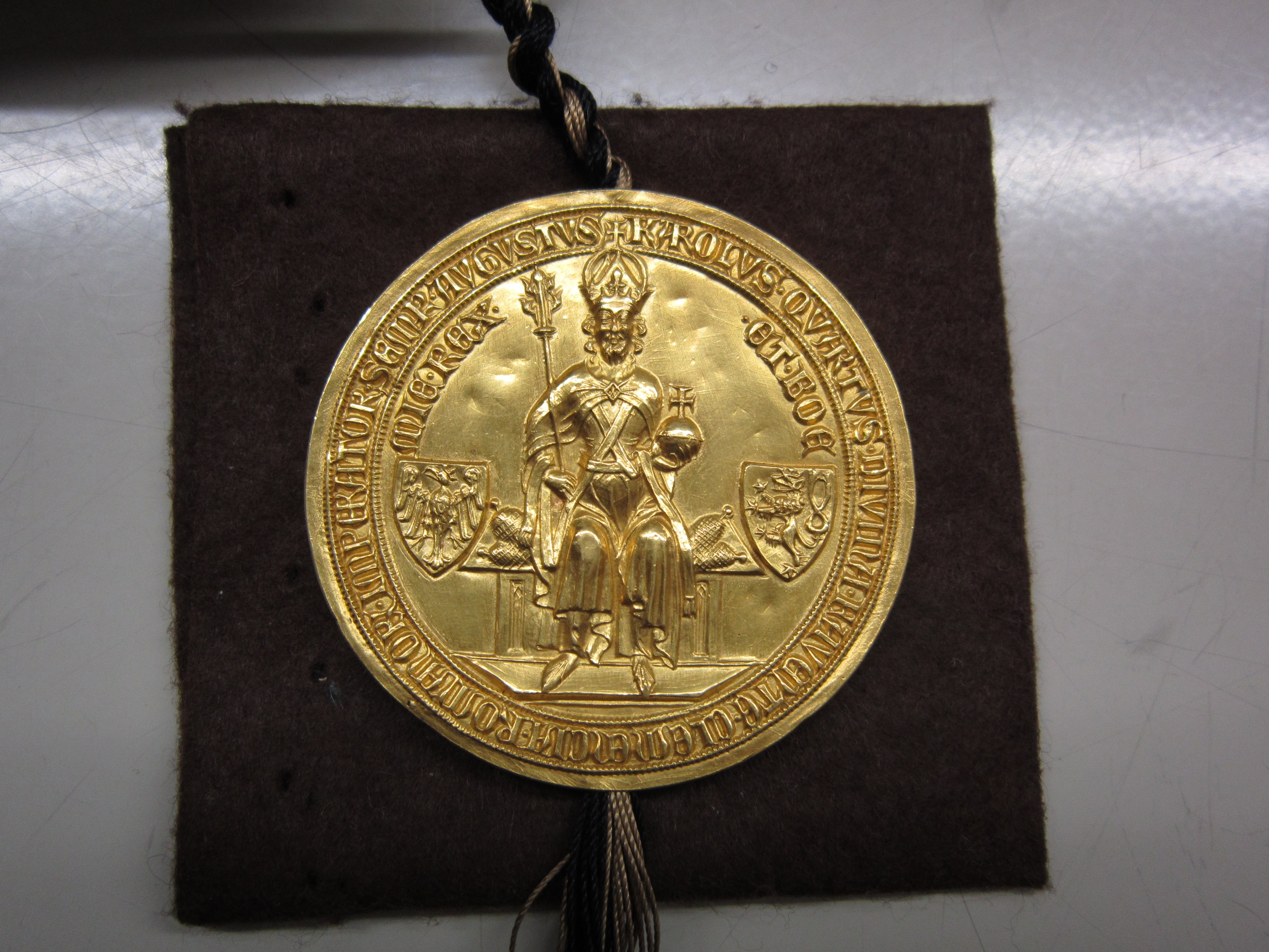 Vorderseite des Siegels des Trierer Exemplars der Goldenen Bulle mit dem Bildnis des Kaisers